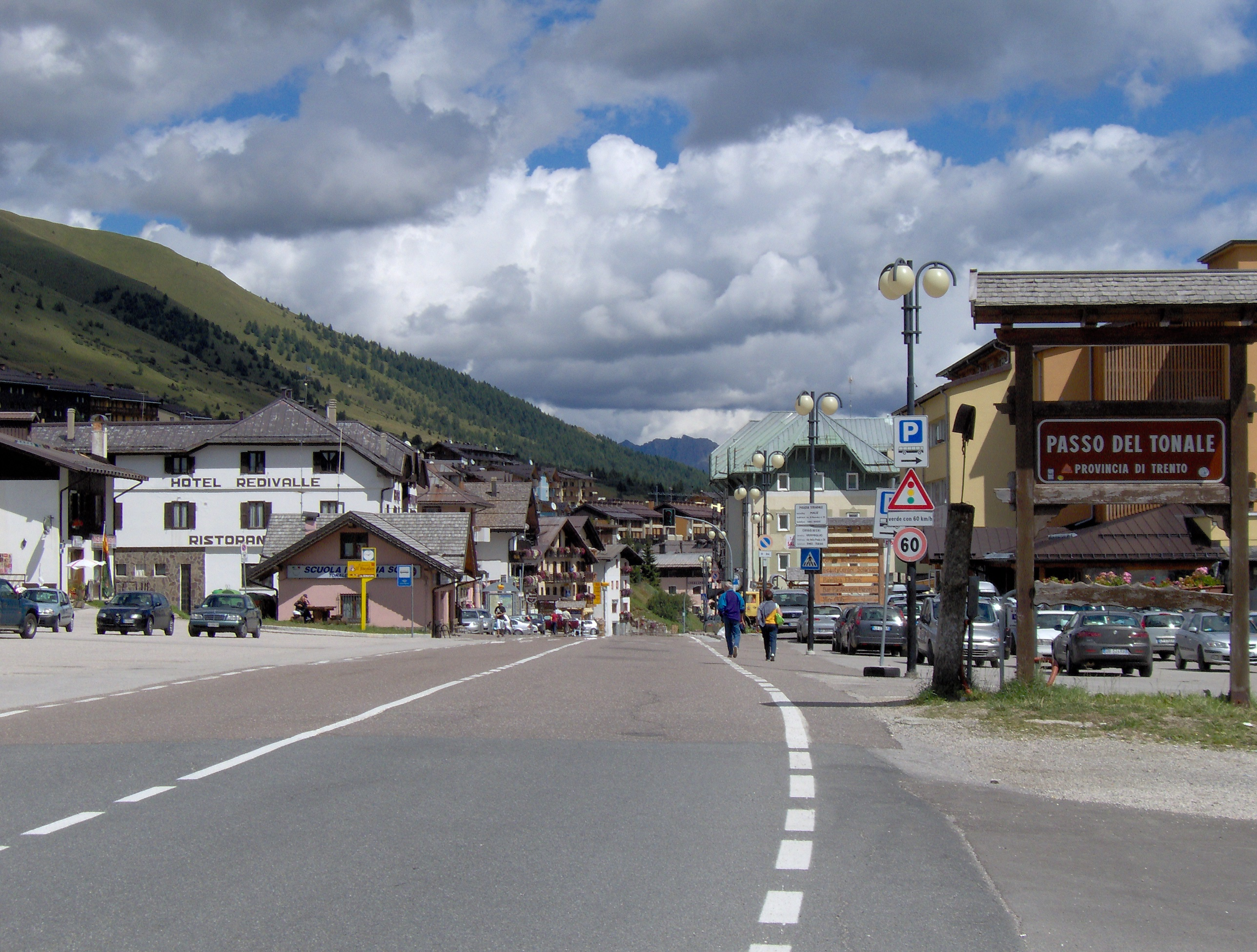 Il Passo del Tonale. Foto da me scattata estate 2006